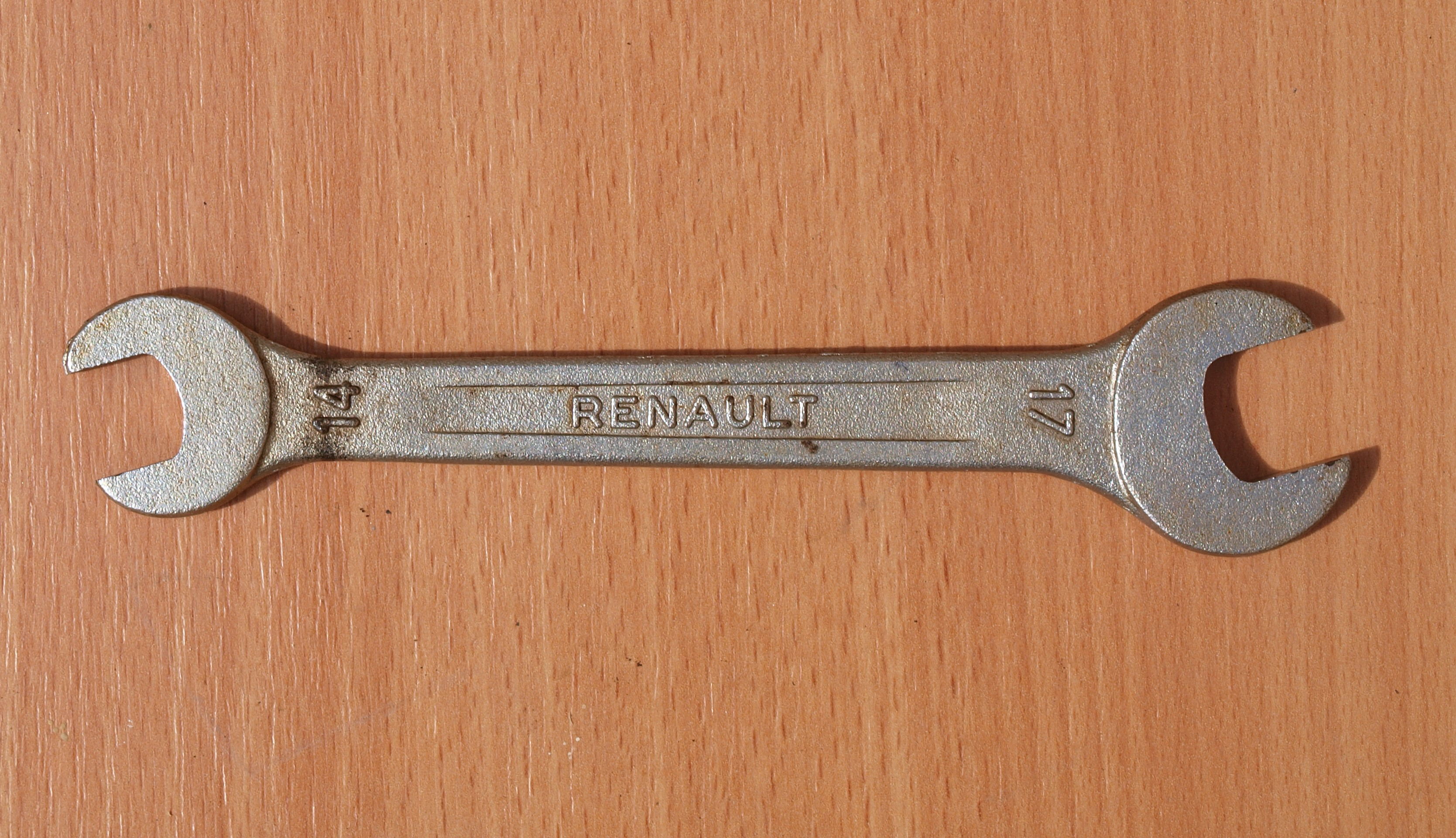 Clé de mécanicien plate de marque Renault